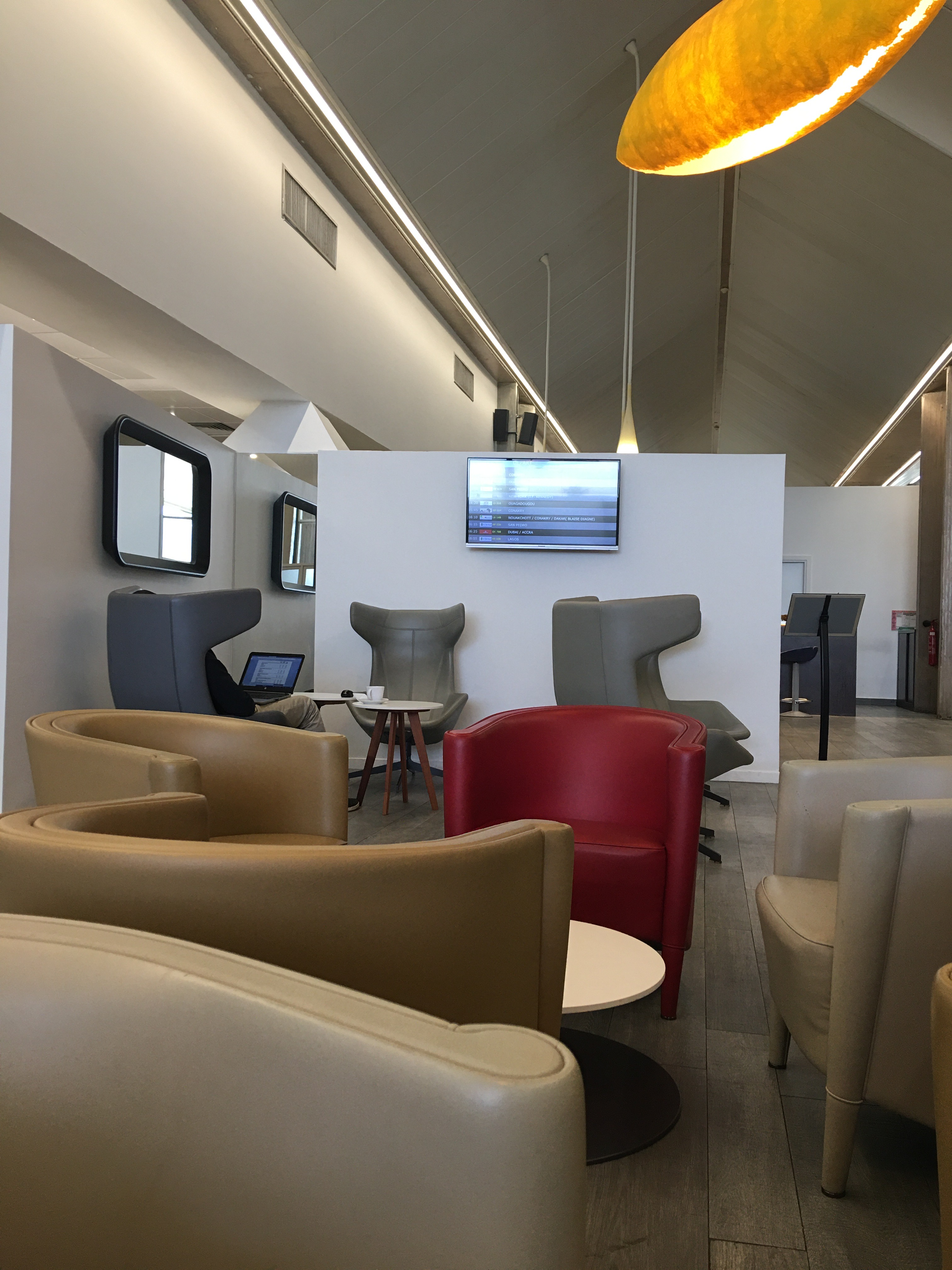 Vue du salon business de l'Aéroport d'Abidjan